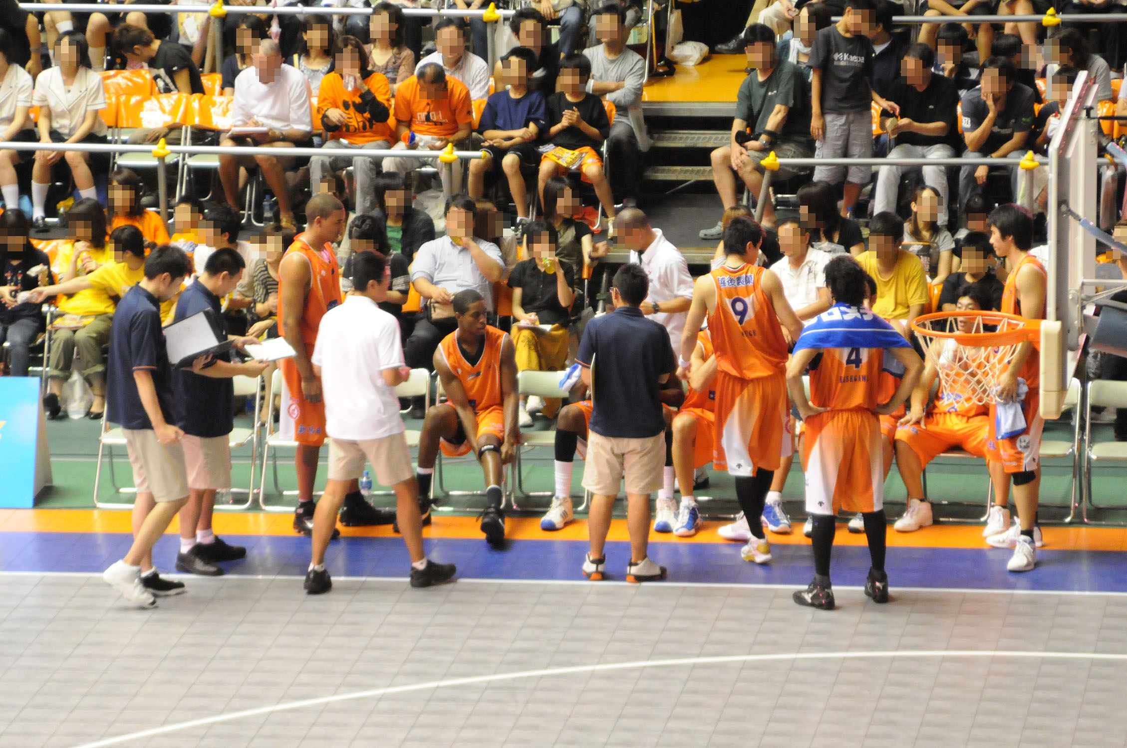 新潟アルビレックスBB、秋田県立体育館で。